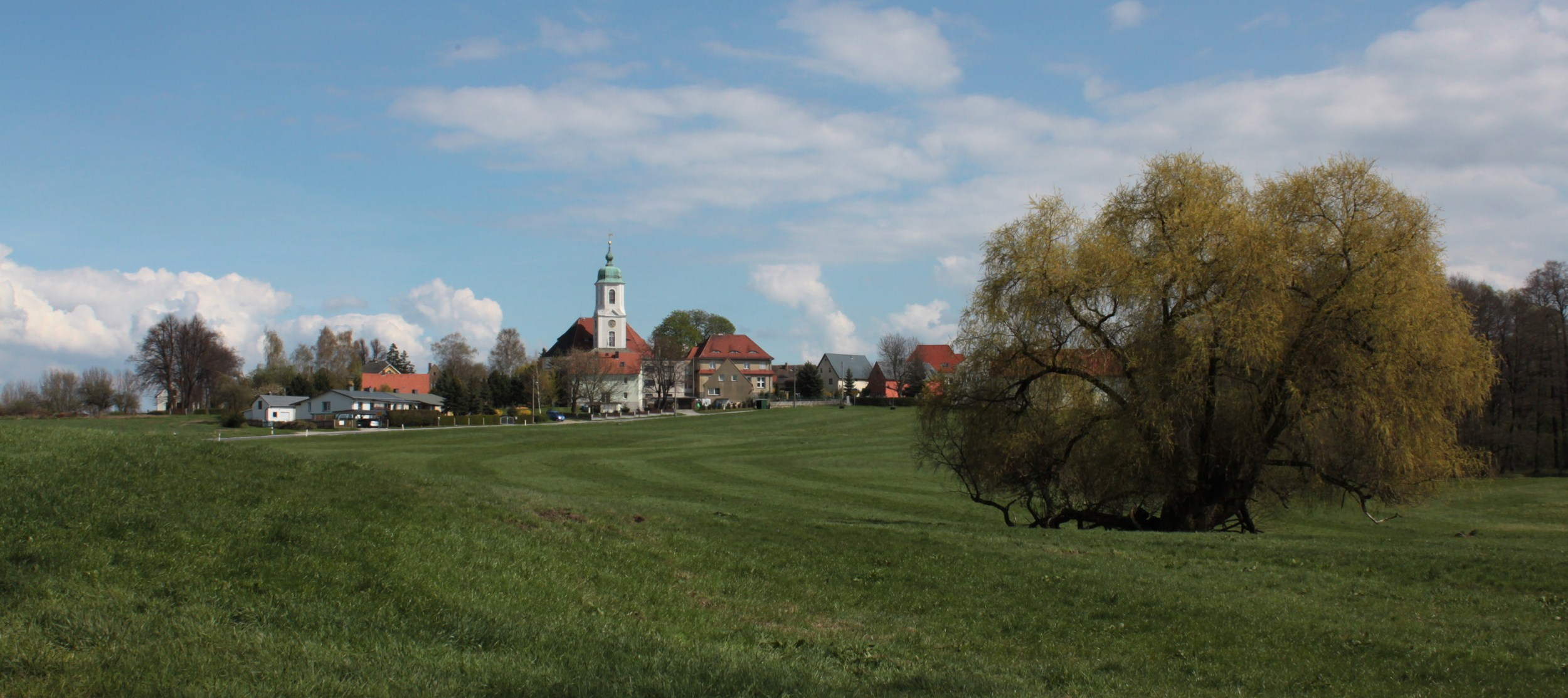 Ortsansicht von Uhyst am Taucher, Gemeinde Burkau, Landkreis Bautzen. Hornjoserbsce: Napohlad Hornjeho Wujězda, gmejna Porchow, wokrjes Budyšin.